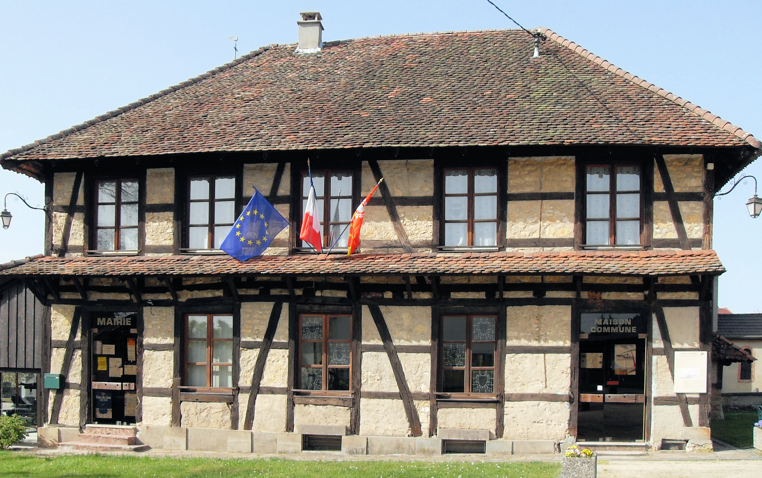 La mairie et Maison commune de Montreux-Jeune